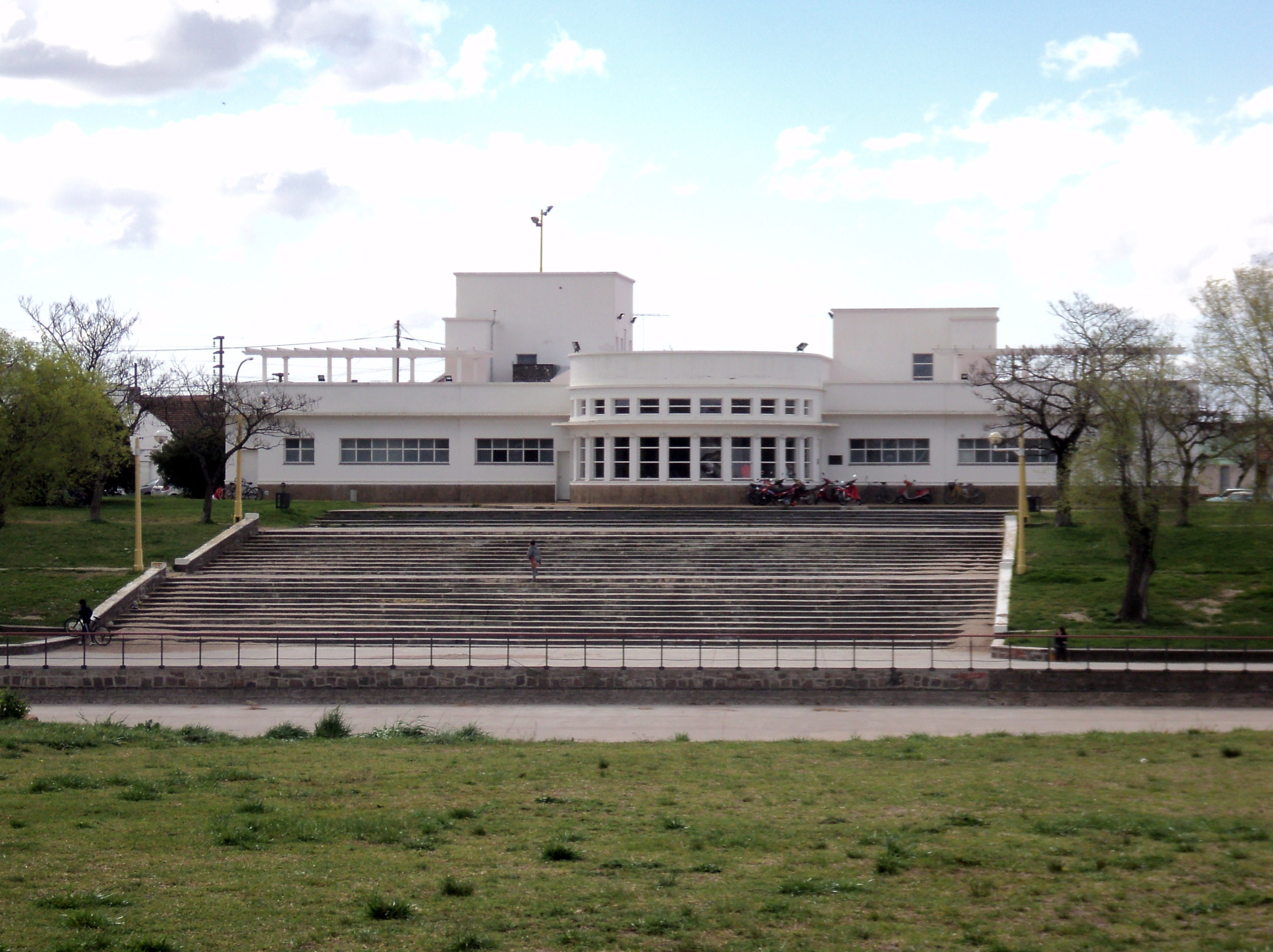 Casa del Bicentenario en la ciudad de Olavarria